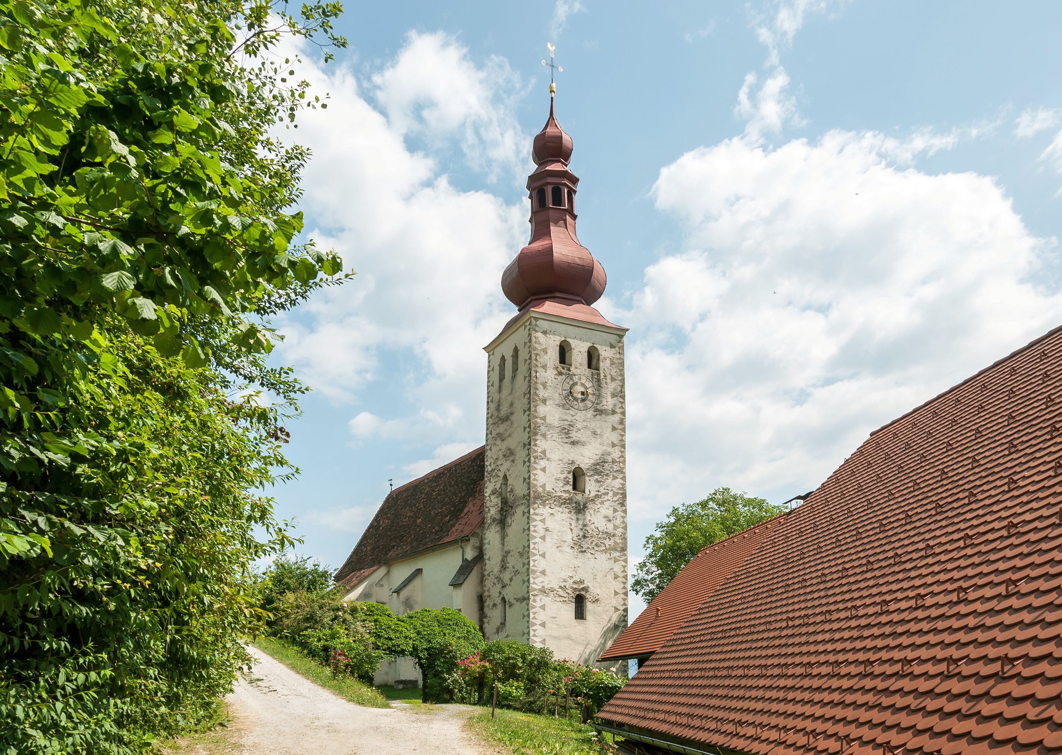 Kath. Filialkirche hl. Johannes d. T. mit ummauertem Kirchhof